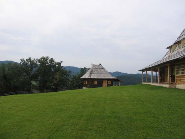 Description:Природне лепоте Златибора author: Snezana Trifunovic Source: self-made